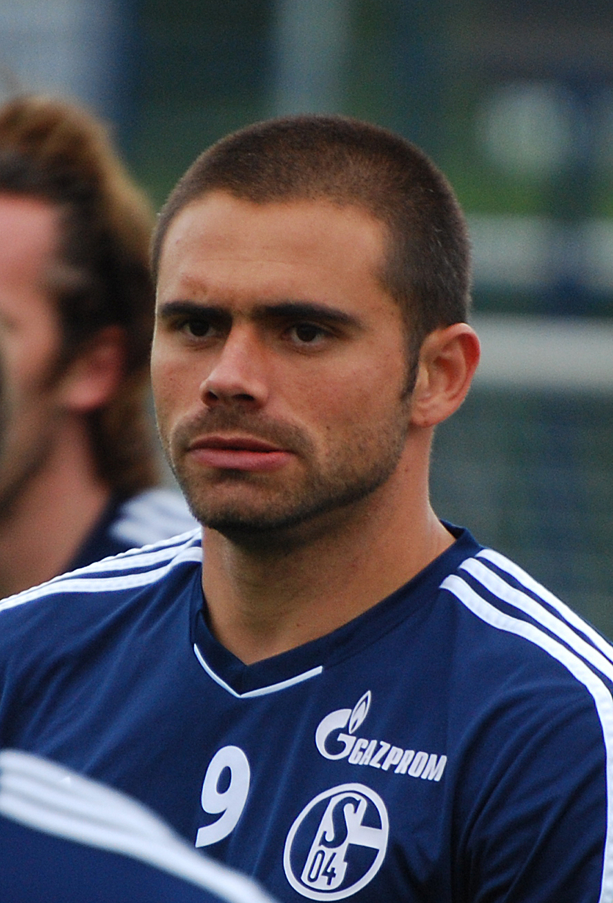 Edu